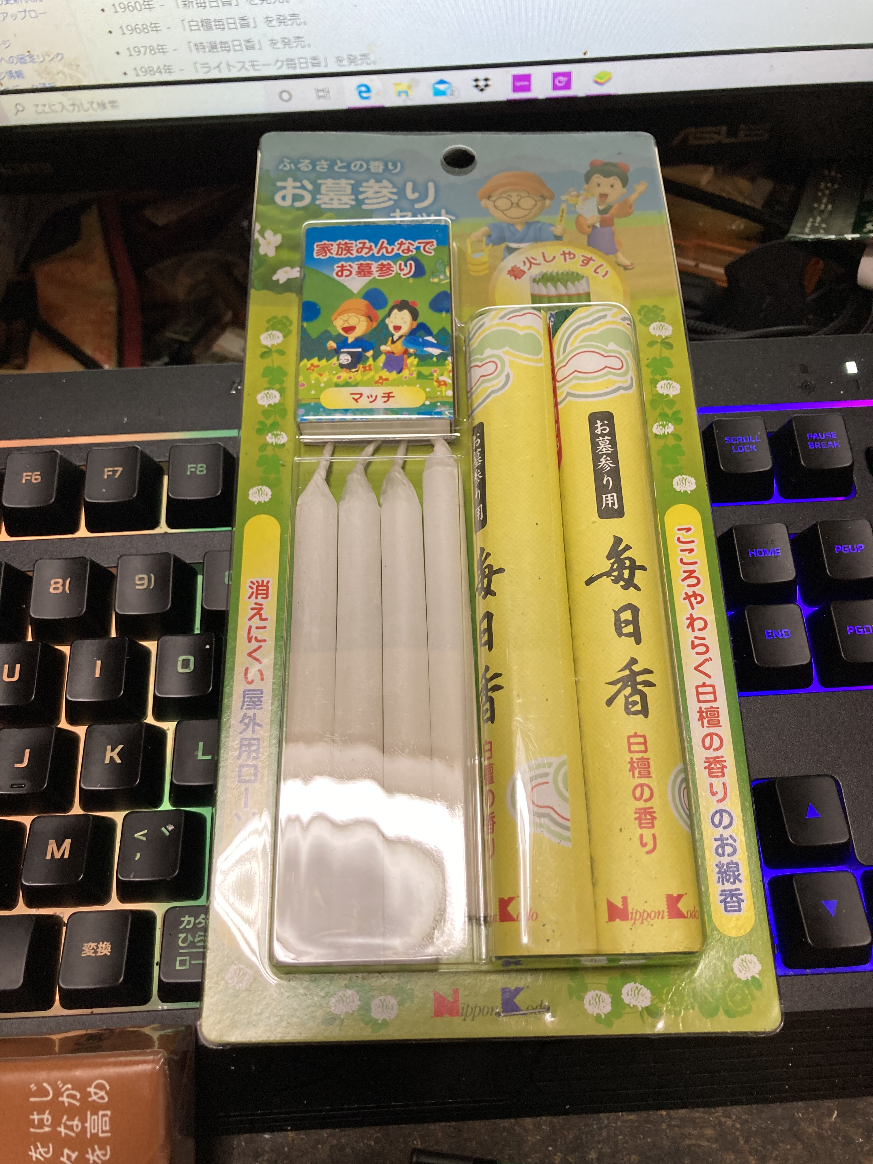 セットでお墓参りに行けるものが詰めあわされている